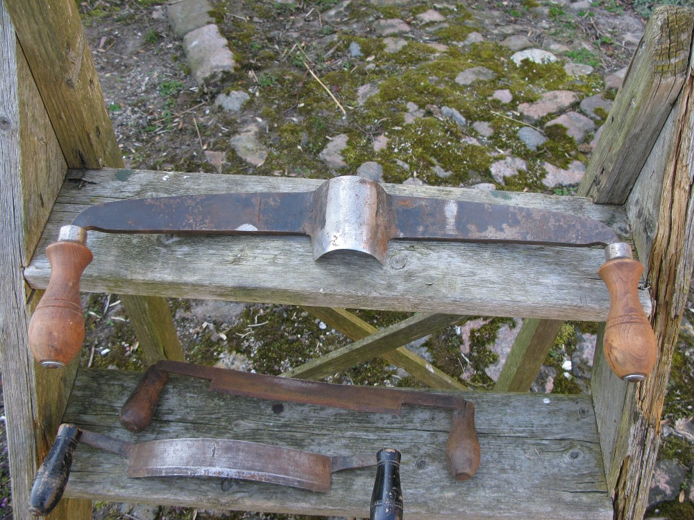 Meddragshøvl